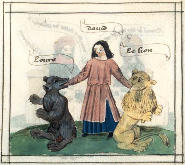 David et bête(s) sauvage(s) dans Speculum humanae salvationis, France, milieu du XVe siècle. Conservé à Paris, BNF, département des Manuscrits, Français 188, fol. 18